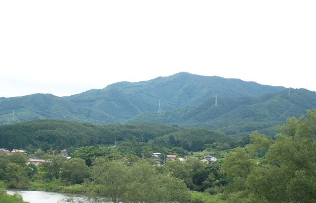 紫波町の北上川付近から望む黒森山